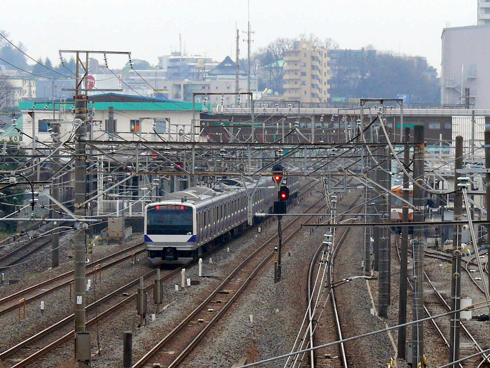 JR常磐線馬橋駅の構内を柏寄りの陸橋上より望む。